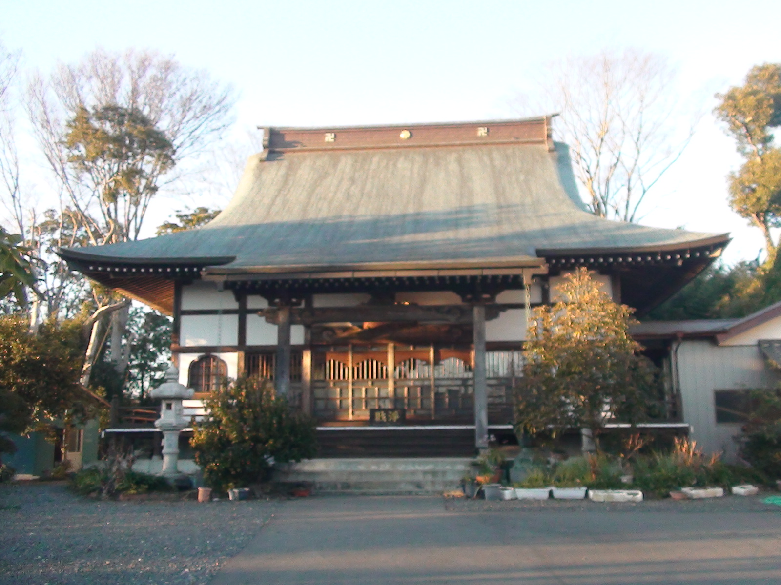 茨城県土浦市沖宿町内にある海蔵寺